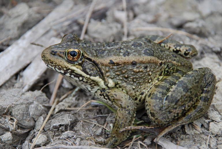 Rana draytonii